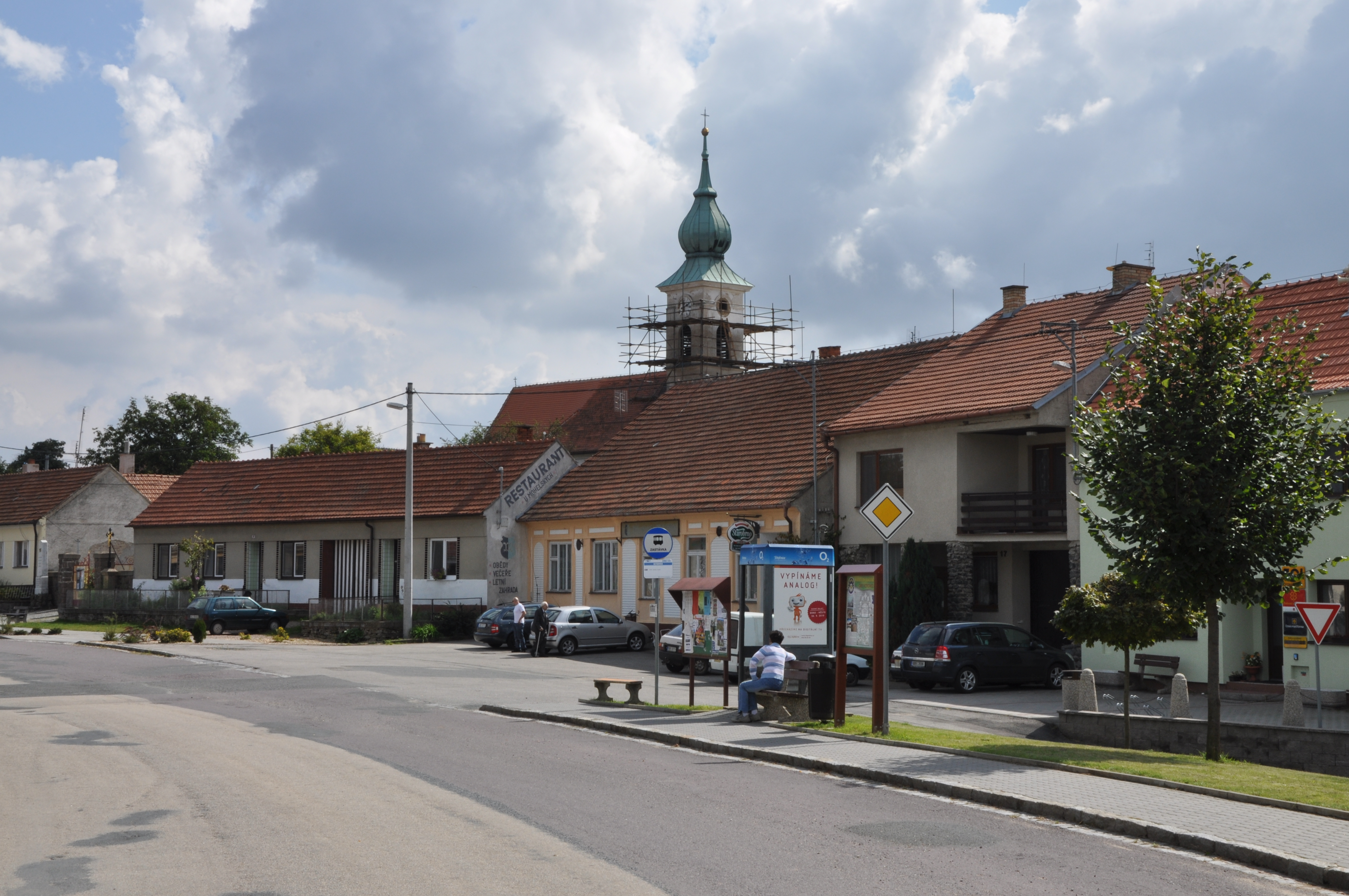 Ketkovická náves směrem k jihovýchodu. Uprostřed okrový hostinec U Mohelských čp. 37 se starou reklamou na štítě domu čp. 38 vlevo, za ním kostel sv. Kateřiny, tehdy opravovaný, k němuž se chodí mezerou mezi domy vlevo. Vpravo za stromem zelená radnice čp. 87 s pobočkou pošty.